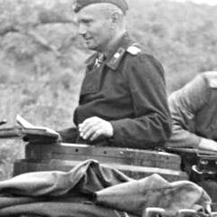 Oberstleutnant Hermann Balk